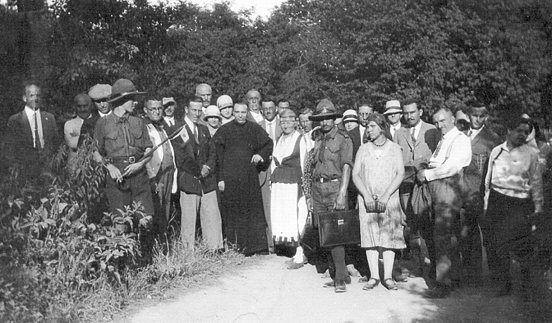 Andreo Cseh besucht ein Zeltlager der Esperanto-Pfadfinder, Budapest 1931